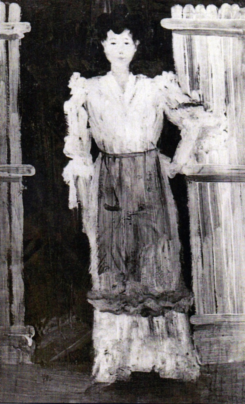 În poartă.